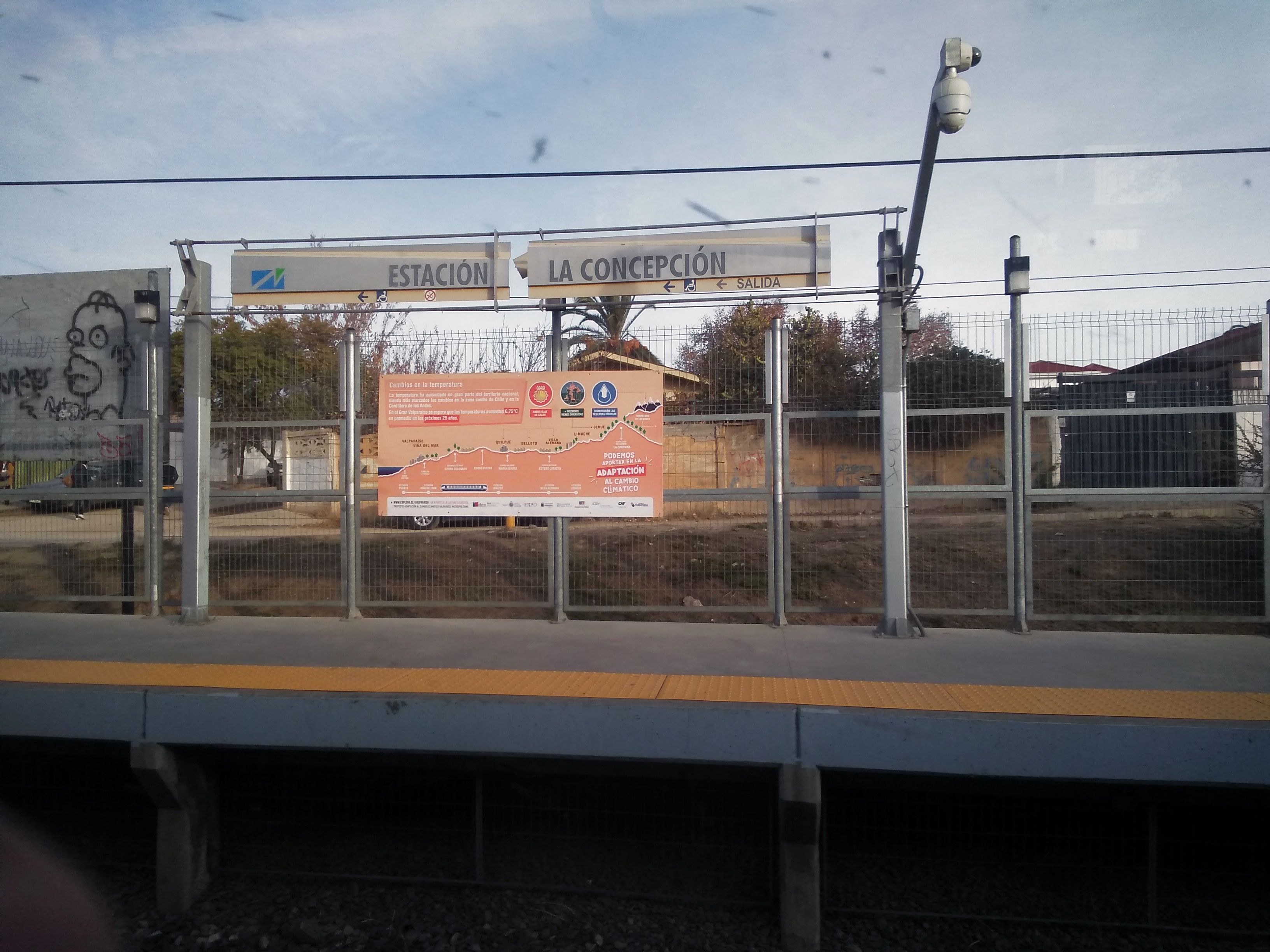 Andén en dirección Limache de la estación La Concepción del Metro Valparaíso.